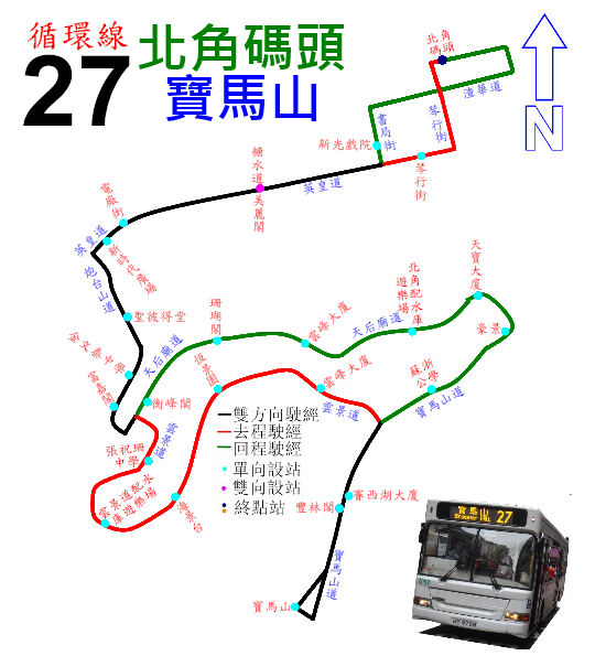 中文（香港）: 新巴27線的走線圖